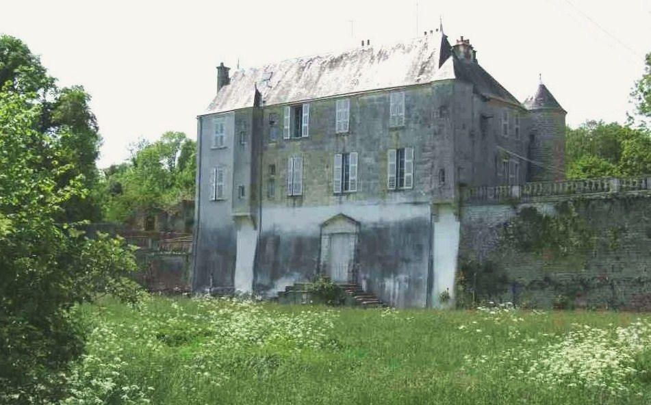 Château de Beaulieu (site internet